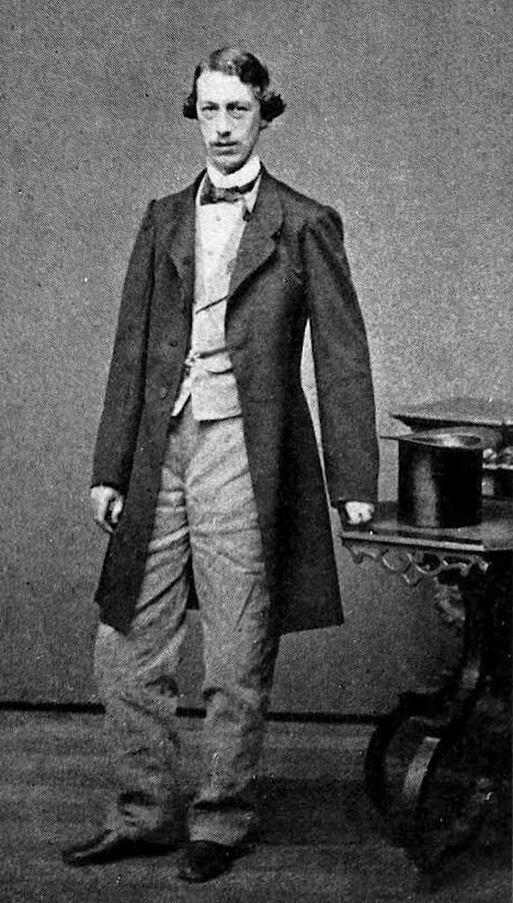 Charles Hale, ca.1861-1865